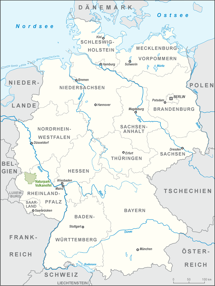 Karte des Naturparks Vulkaneifel in Deutschland